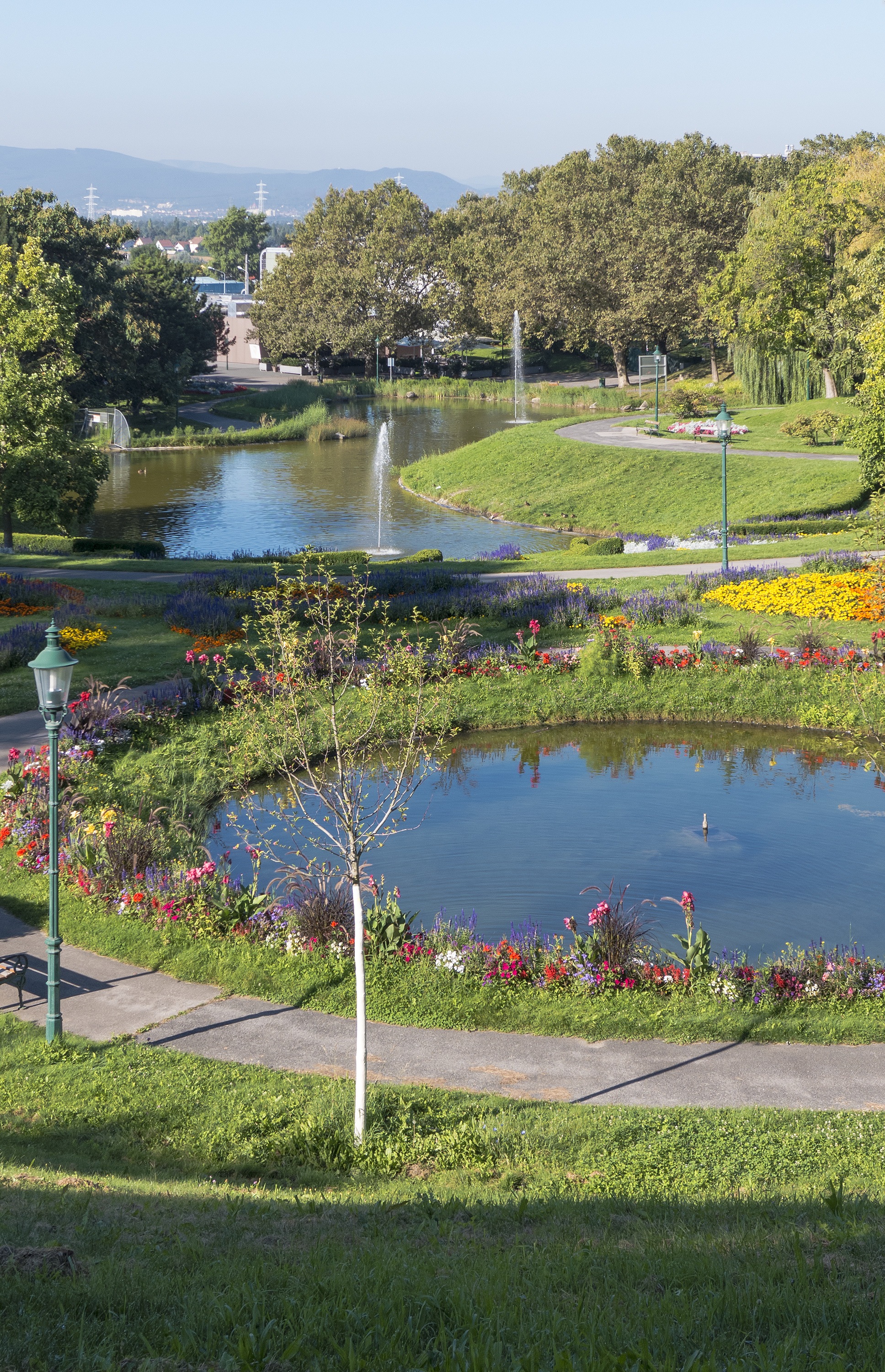 Kurpark Oberlaa in Wien 10, Kurgarten